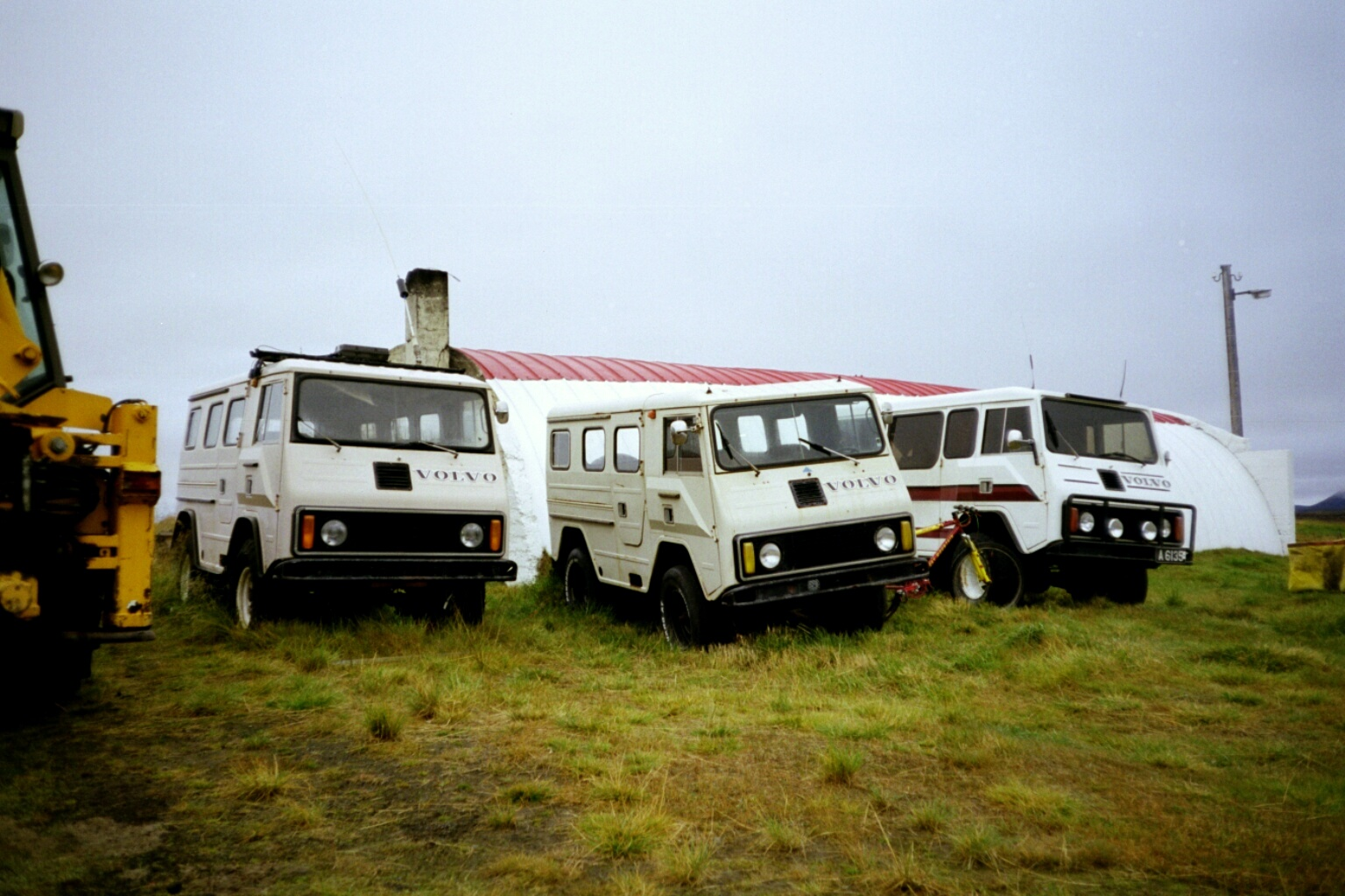 Drei Volvo C202 an den Einsiedelhöfen Grimsstaðir/Island